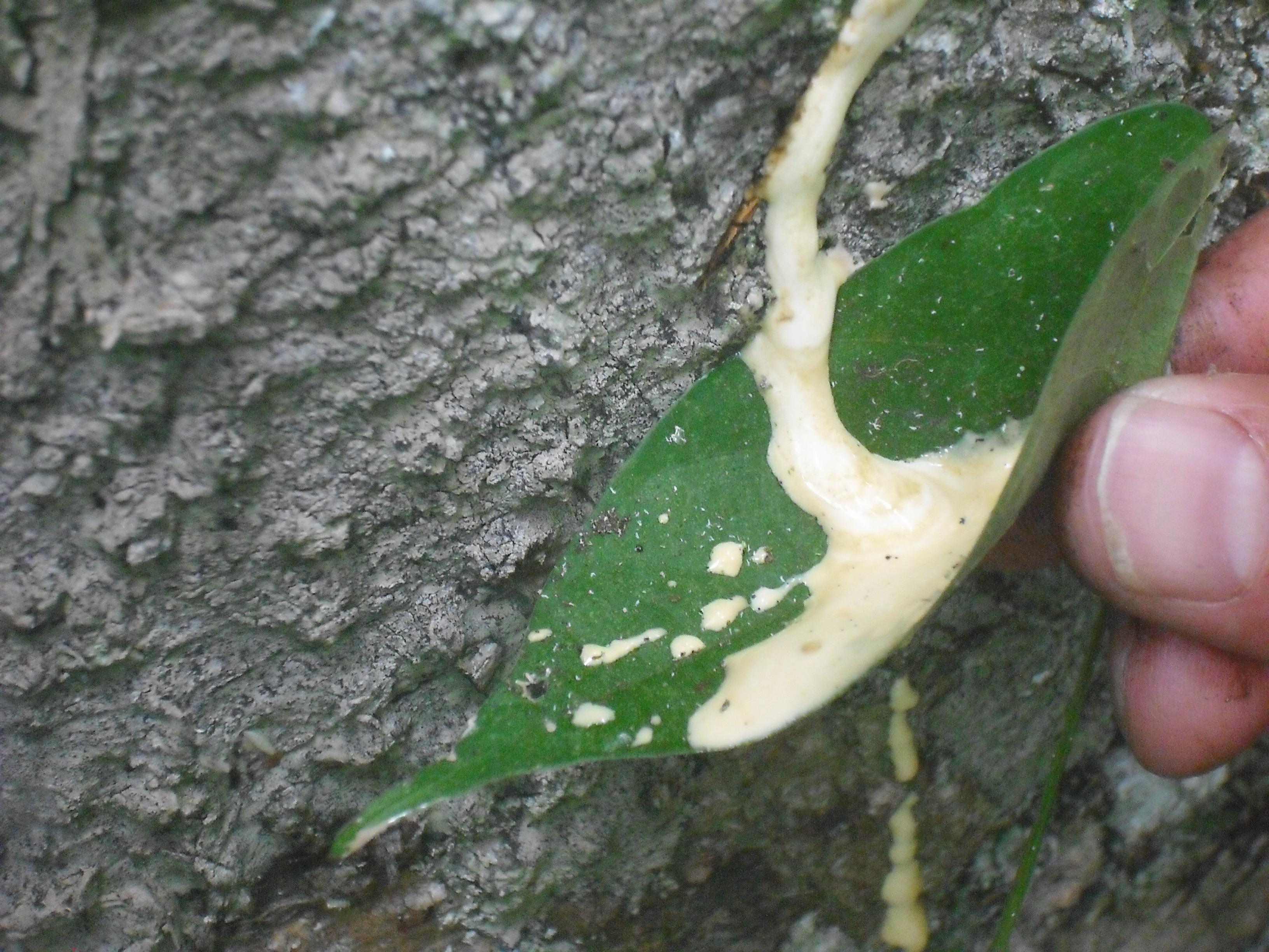 Albero di Hule -Museo Leone de Ujarras Costa Rica